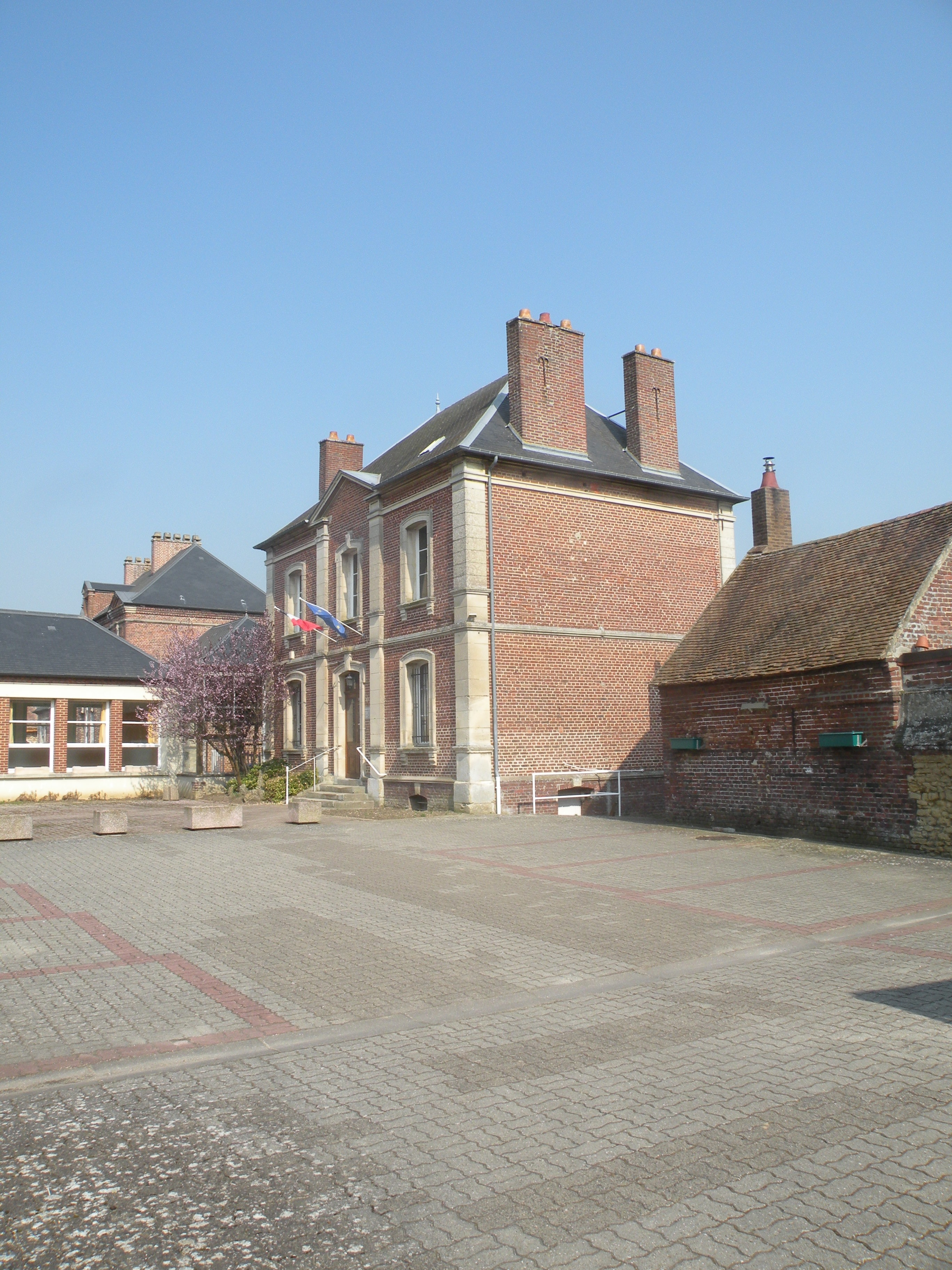 mairie de Warluis